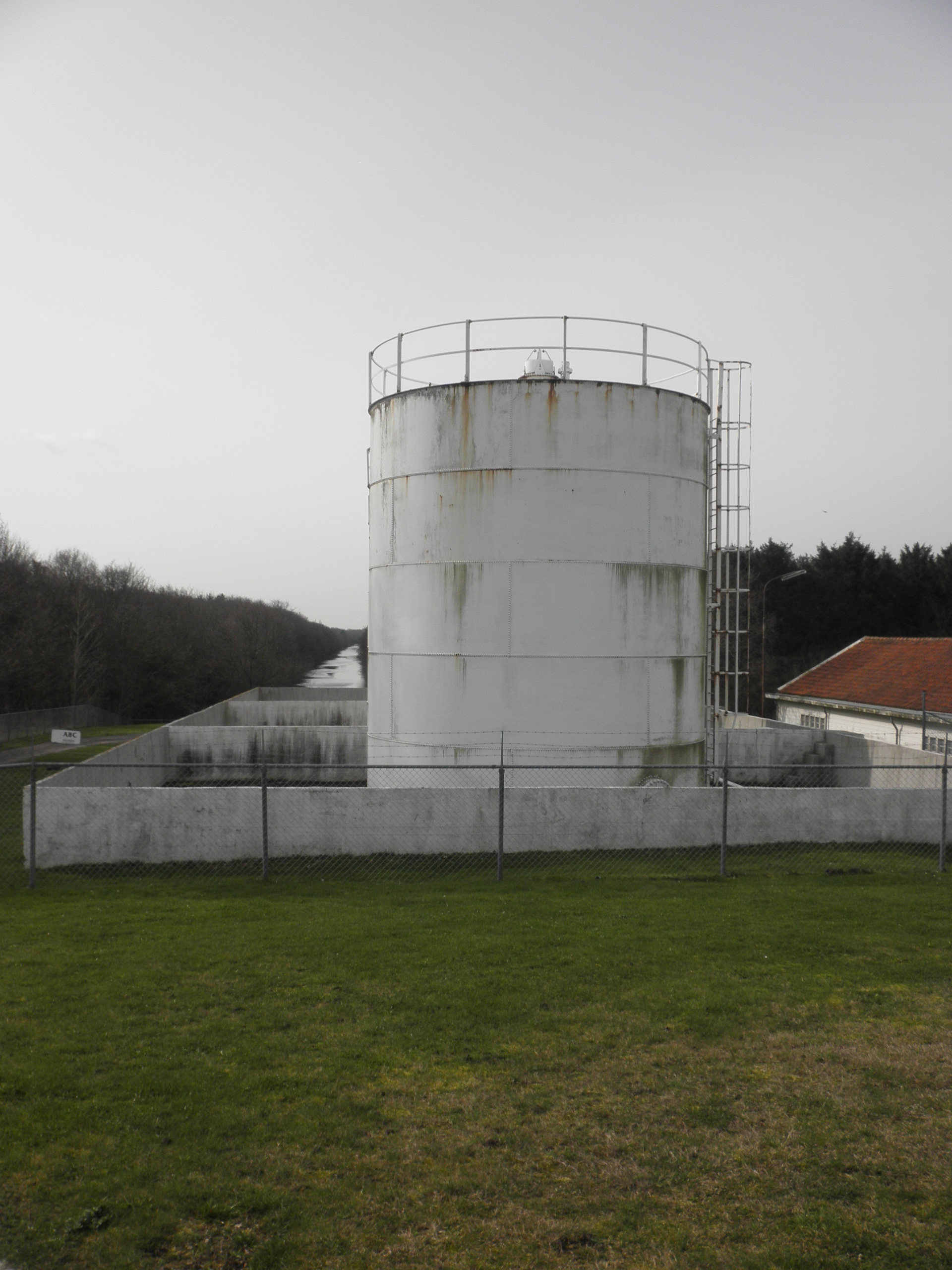 Gemaal Leemans. De drie ijzeren brandstoftanks. Alleen de voorste tank is duidelijk te zien, maar de drie betonnen bakken waarin de tanks staan, zijn wel zichtbaar. Rechts van de tank nog een klein stukje van de houten loods (ook monument). Op de achtergrond een van de twee hoofd kanalen.